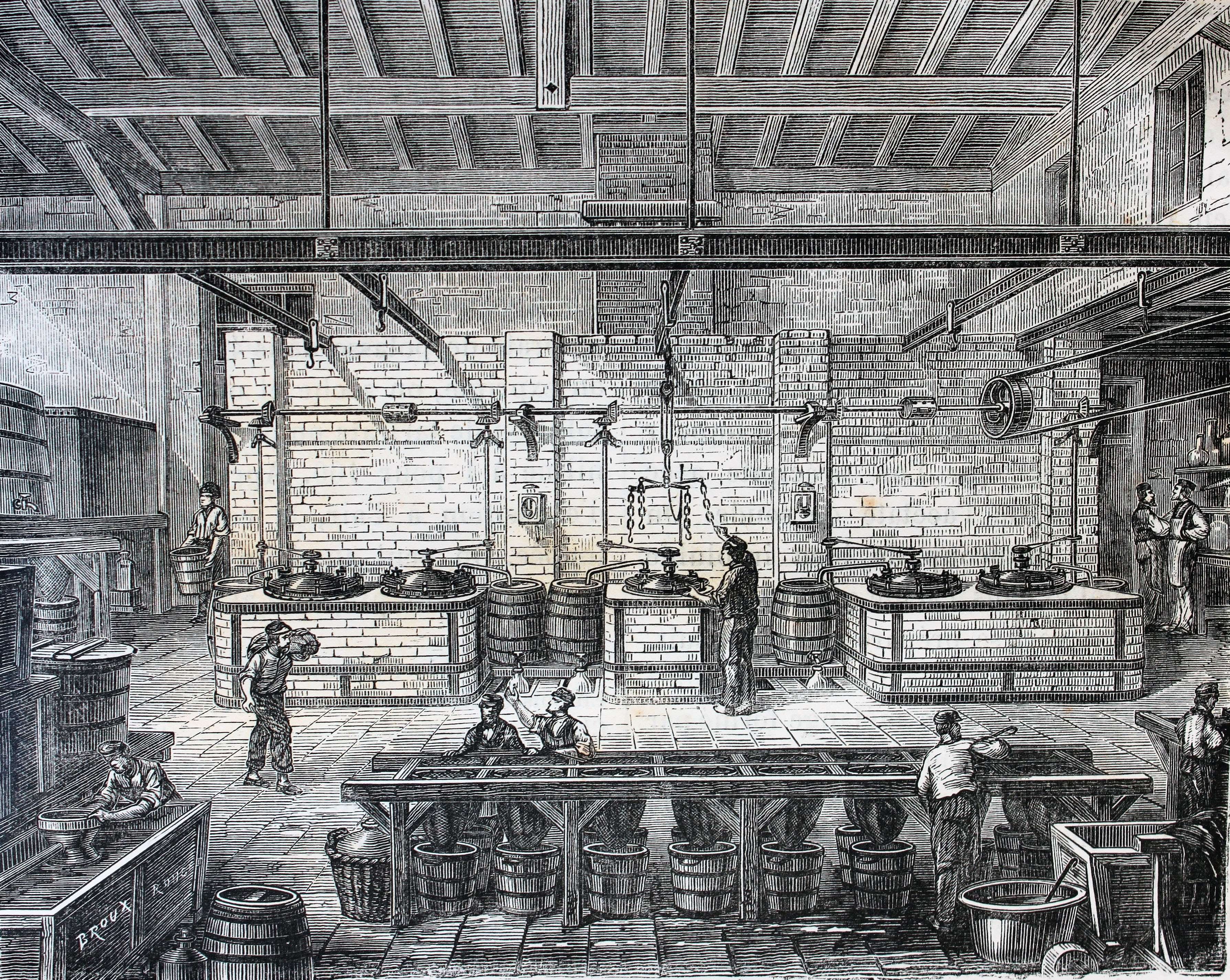 Ilustraciones de la obra : Les merveilles de l'industrie ou, Description des principales industries modernes / par Louis Figuier. - Paris : Furne, Jouvet, [1873-1877]. - Tome II